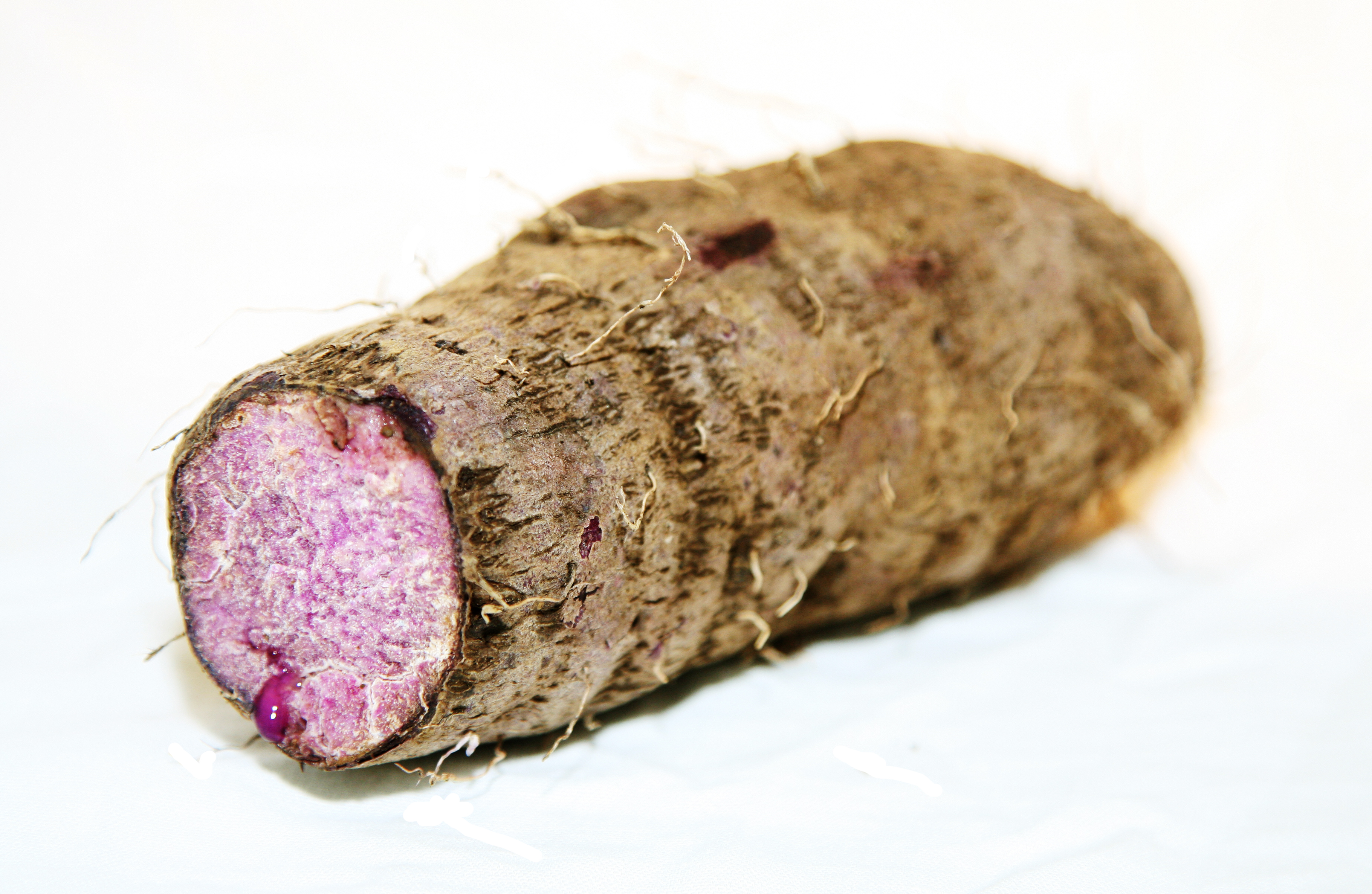 Dioscorea alata tuber, Marché du Chaudron, Saint-Denis de La Réunion